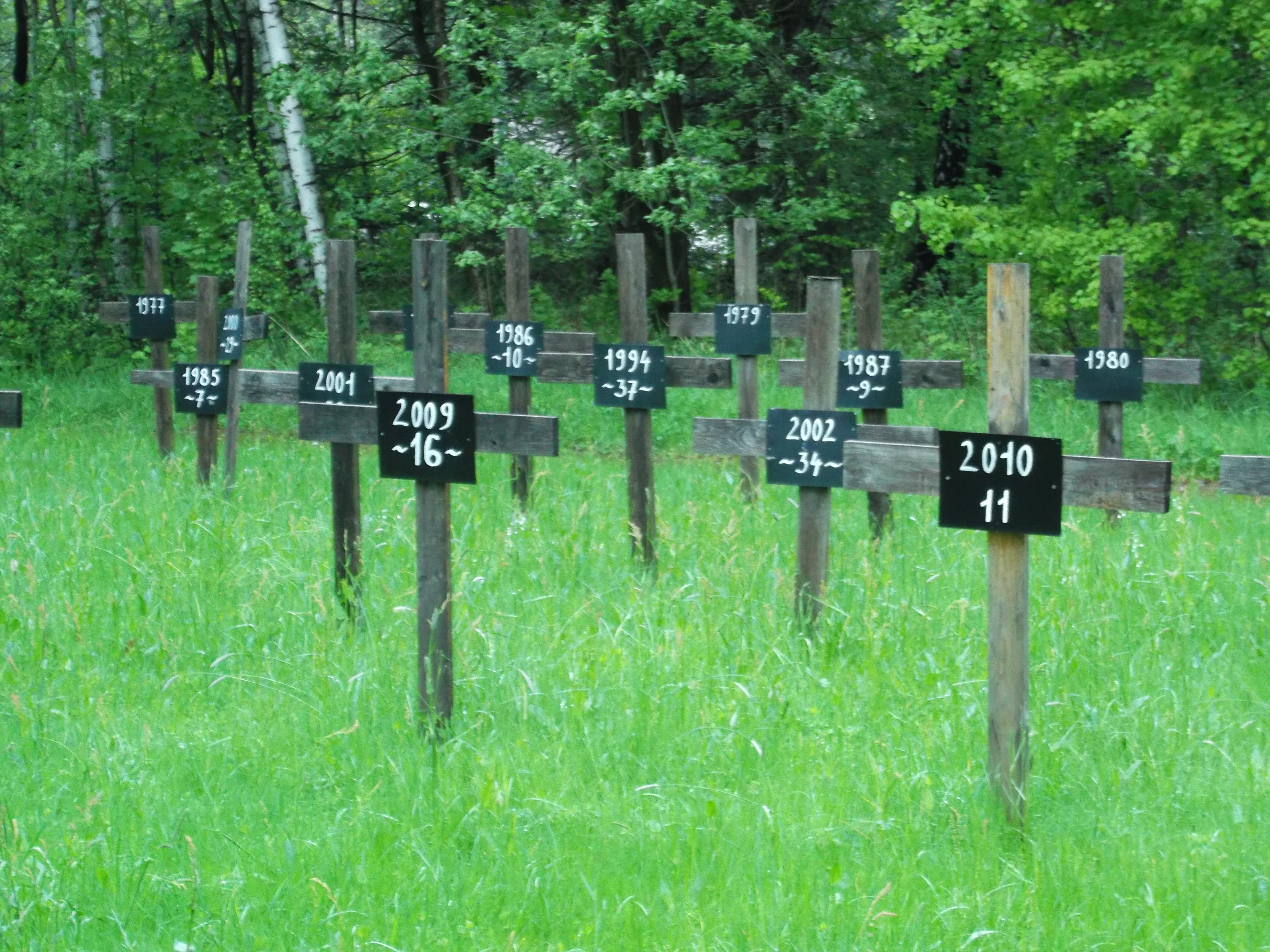 Památník obětem dopravních nehod na dálničním odpočívadle dálnice D1 u Pávova (ve směru na Brno, resp. Ostravu).